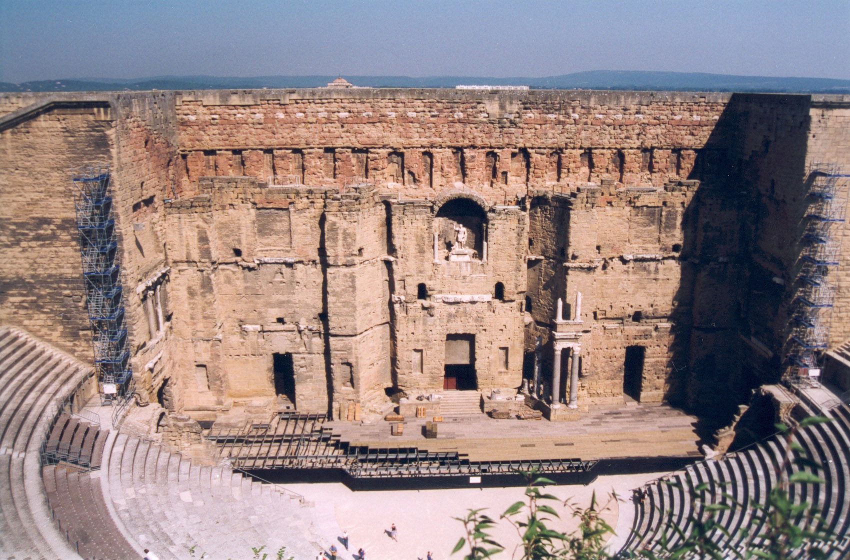 Théatre antique d'Orange